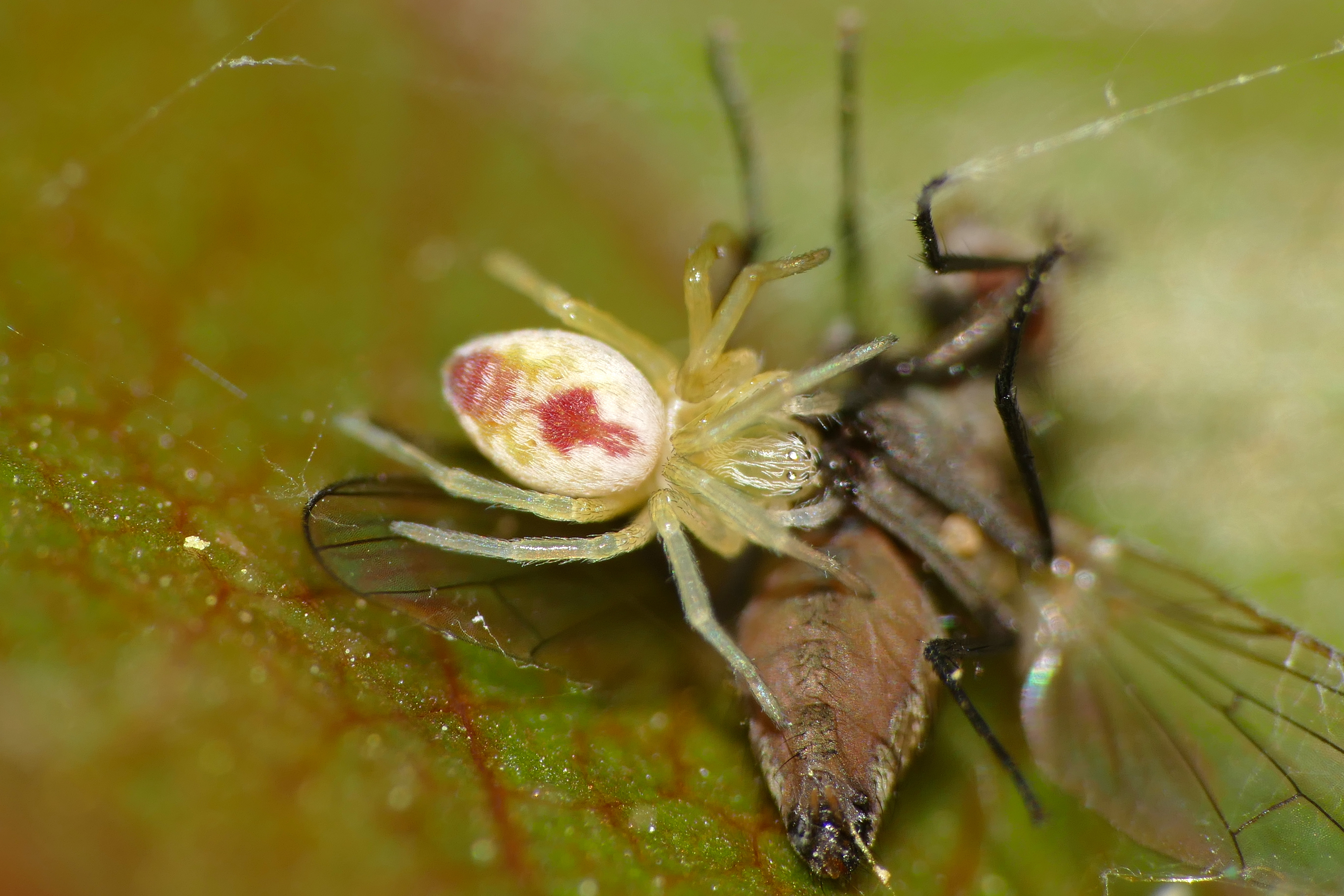 Urou-et-Crennes, Orne, FRANCE